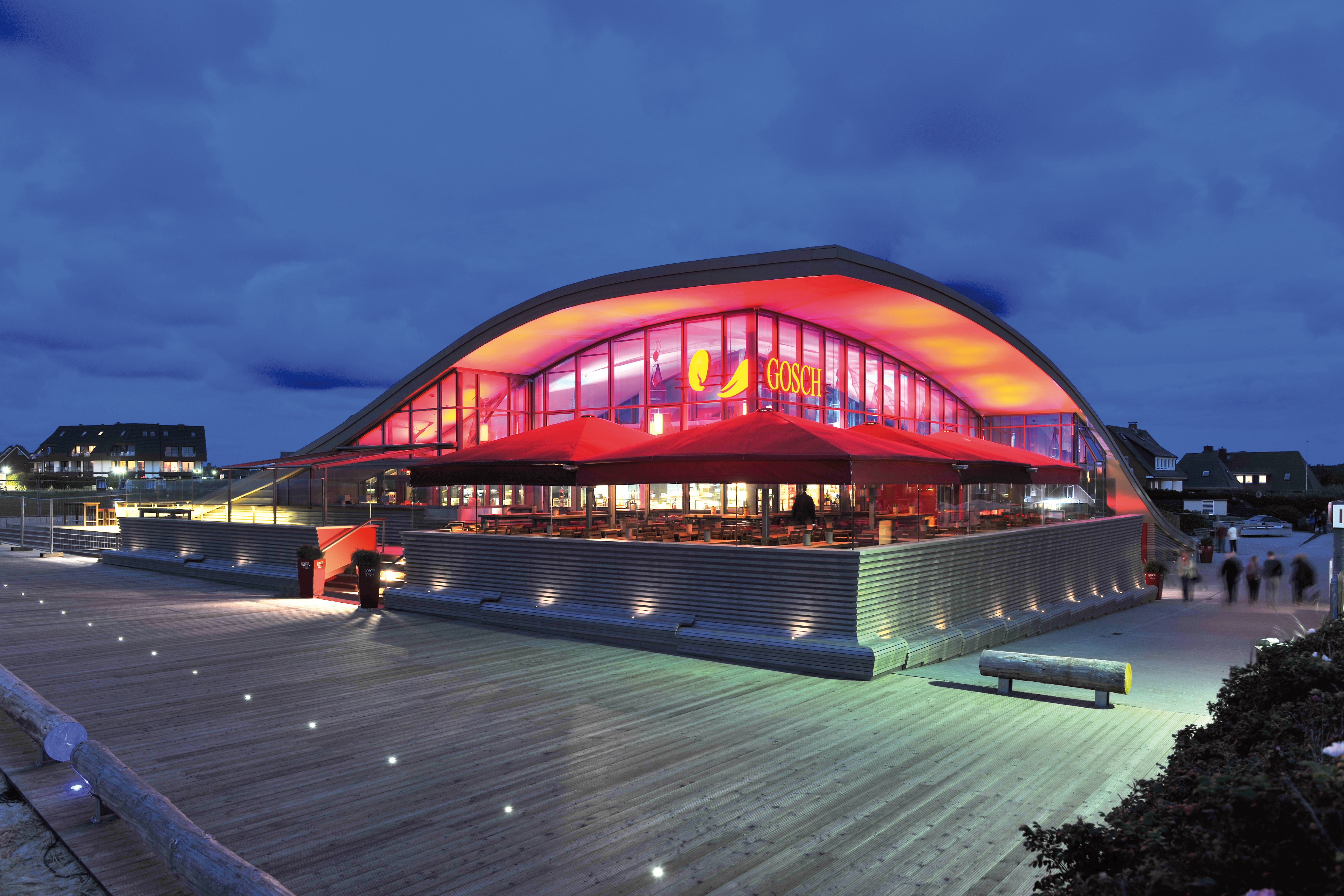 Der Neubau des Gosch Restaurants am Kliff in Wenningstedt wurde 2012 eröffnet.